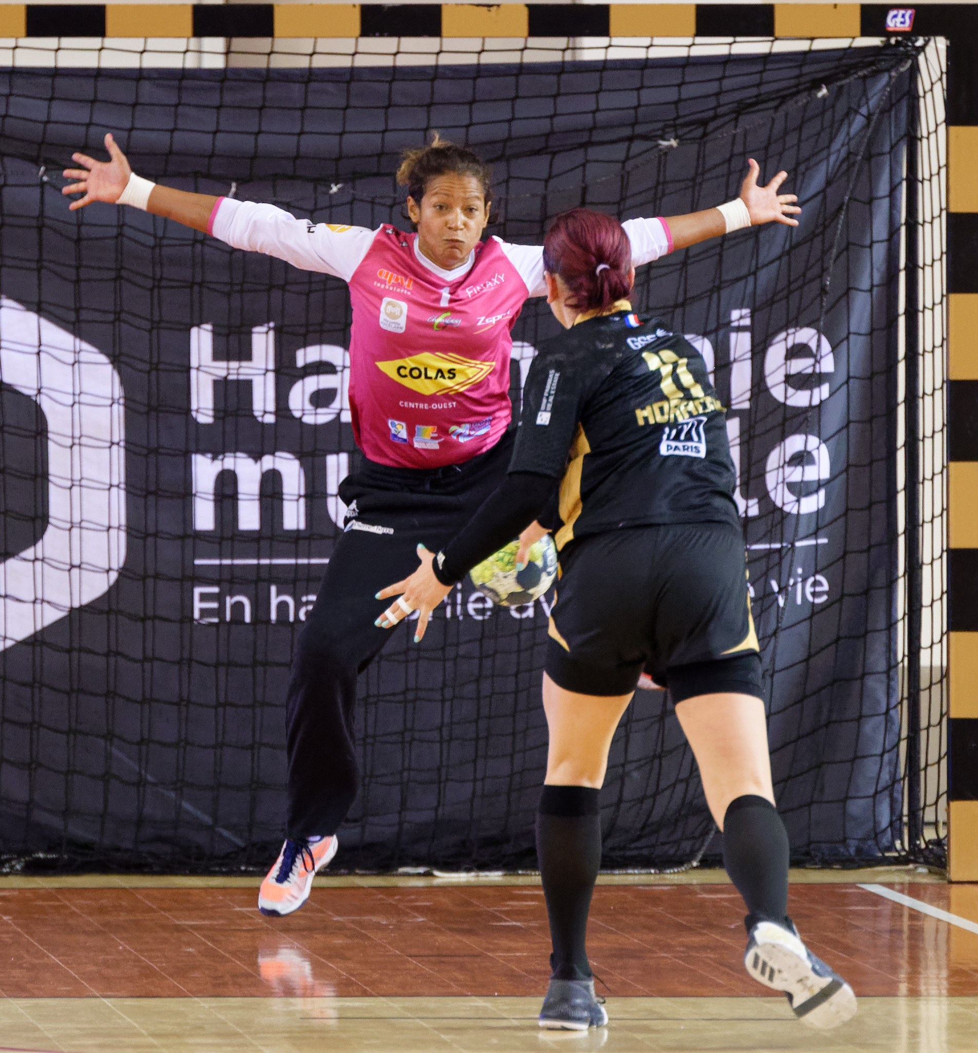 Rencontre Issy Paris Hand / Chambray. A Issy Les Moulineaux, le 15 septembre 2017.